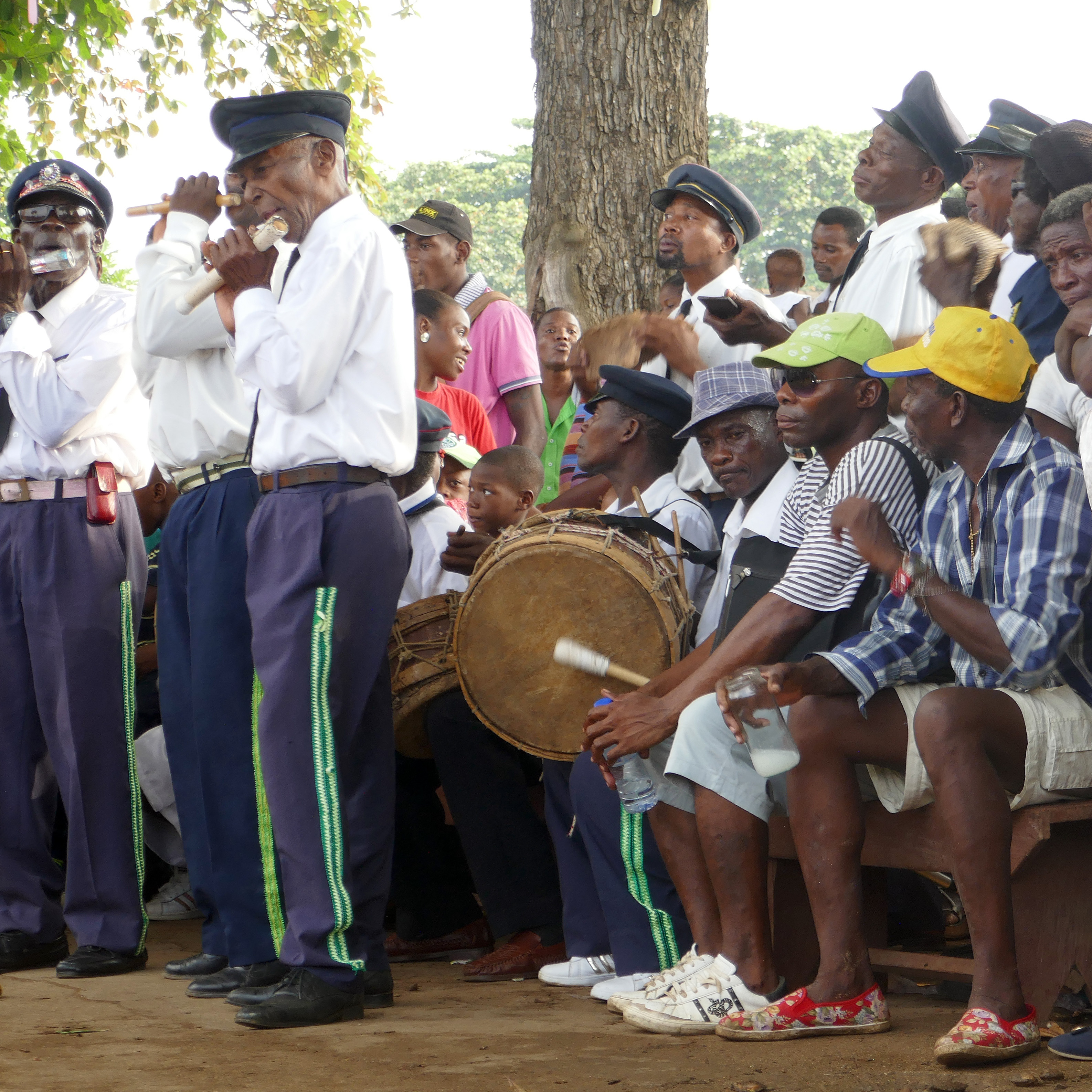 Tchiloli représenté devant l'église São Pedrão de São Tomé à l'occasion de la fête patronale. Le tchiloli est une forme théâtrale, musicale et dansée créée au XVIe siècle, jouée par des pêcheurs et des paysans. Traditionnellement elle met en scène la seule pièce du répertoire, La tragédie du marquis de Mantoue et de l'empereur Charlemagne". This is an image with the theme "Play" from: Sao Tome and Principe